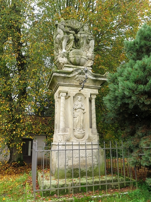 Sloup se sousoším Nejsvětější Trojice, náves, proti domu čp. 10, Dolní Podůlší.